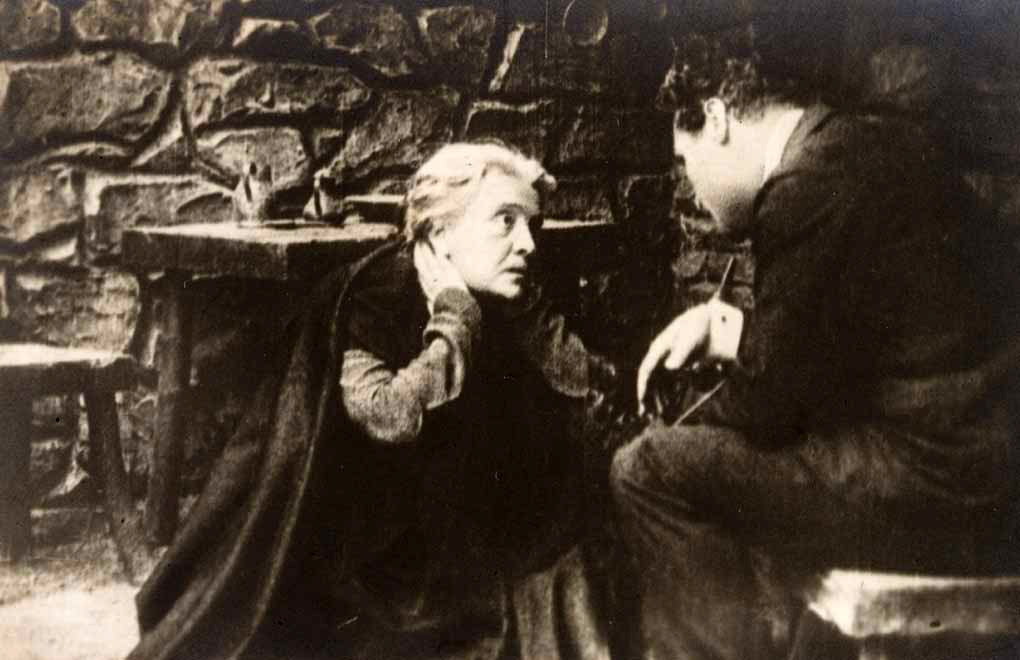 Description